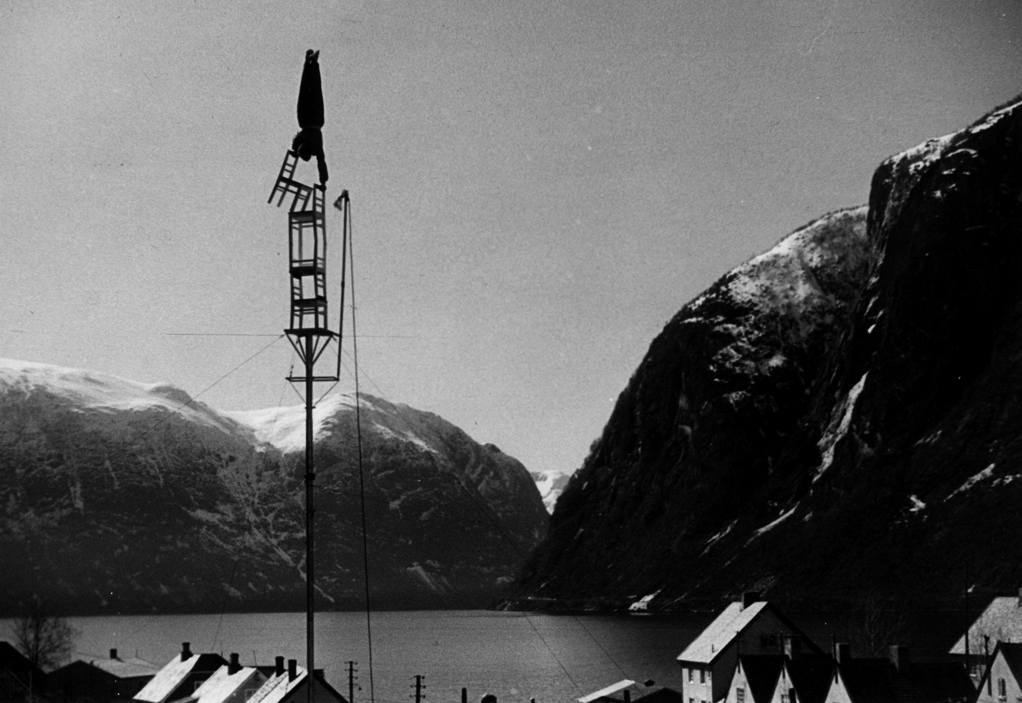 Tell Teigen balanserende på stoler på en mast på Gråberget i Høyanger i 1956